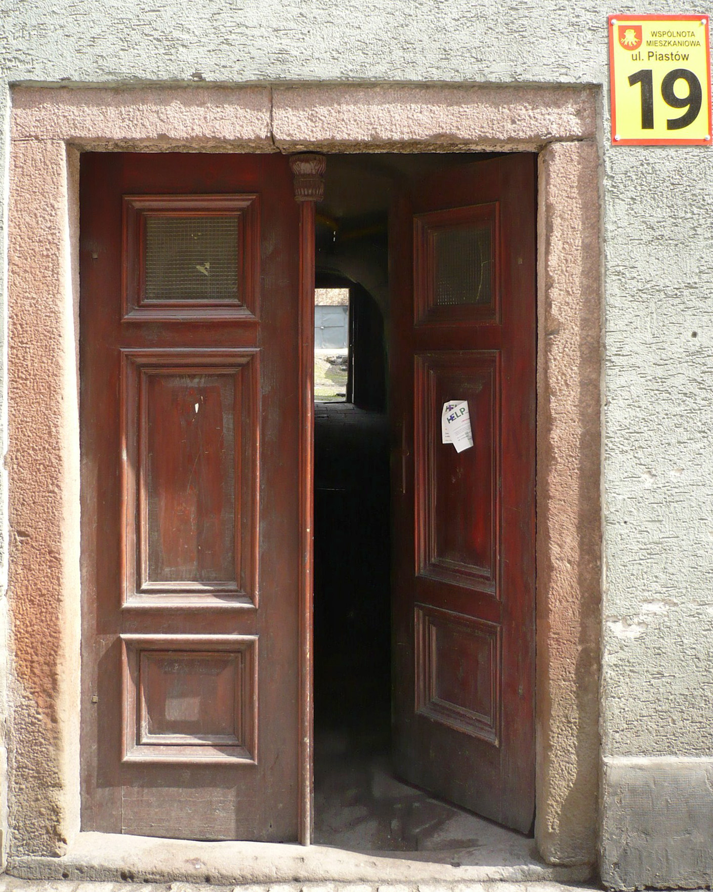 Nowa Ruda, ul. Piastów 19 - brama domu z XVI w., 1890 (zabytek nr A/946/1550/WŁ z 9.01.1997)